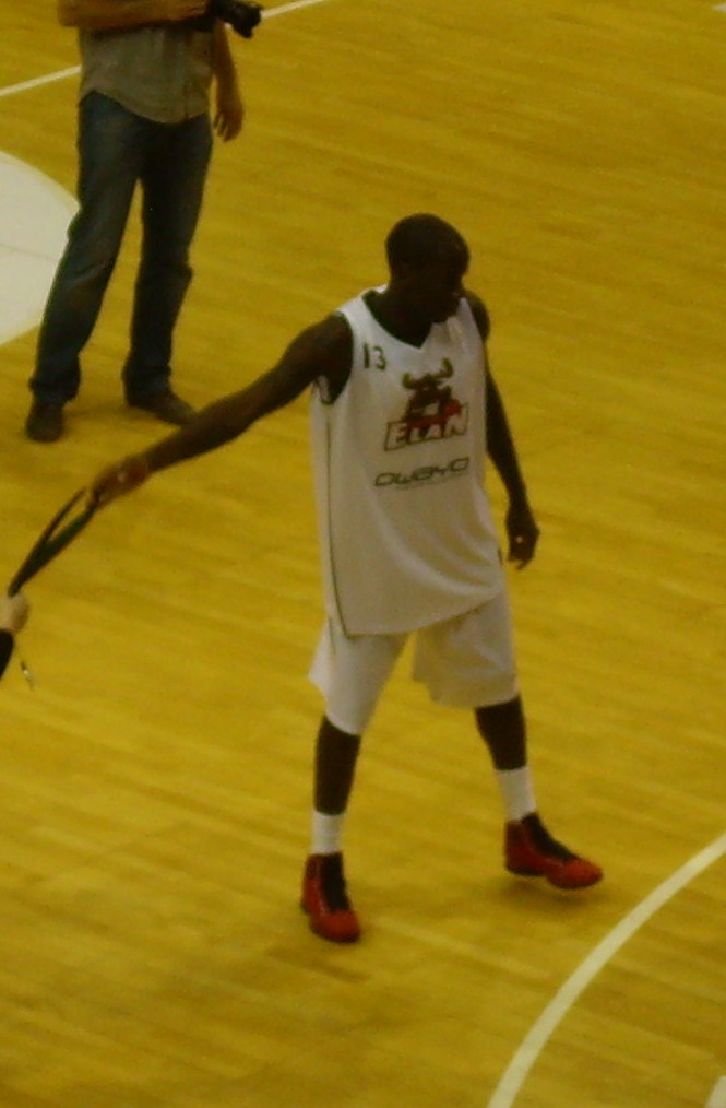 Steed Tchicamboud avec sa médaille d'argent des Championnat d'Europe 2011, lors du match amical Elan Chalon - JL Bourg-en-Bresse